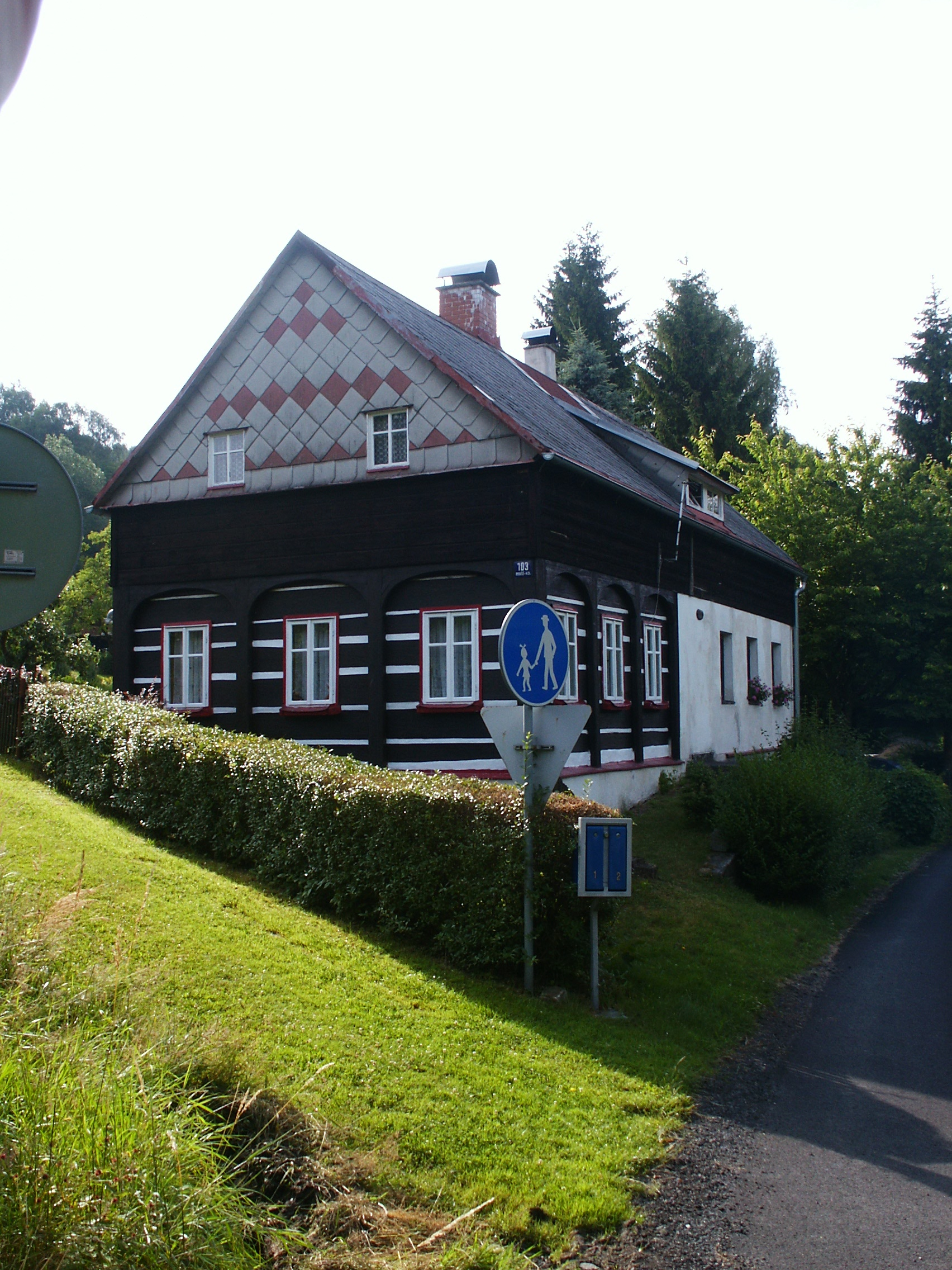 Nová Chřibská - č.p. 103